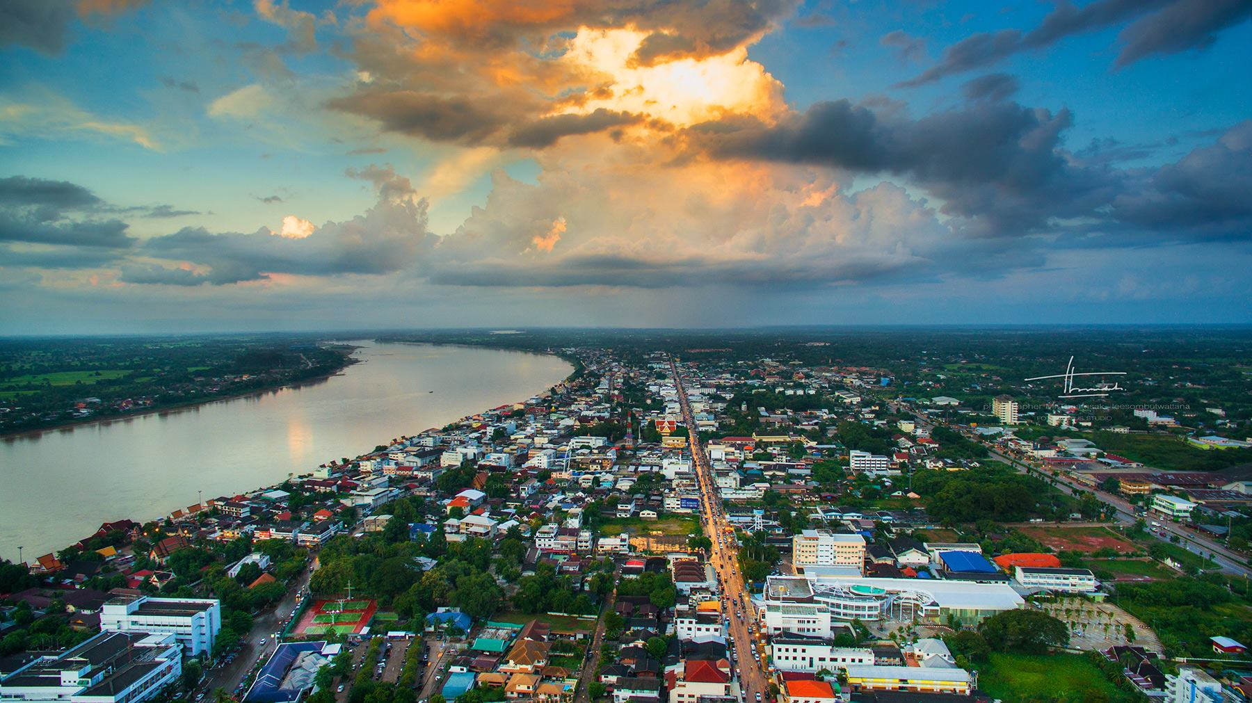 ภาพมุมสูงเมืองหนองคาย 2015